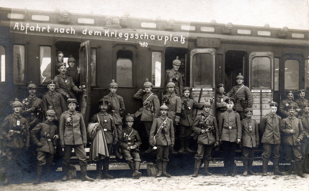 "Abfahrt nach dem Kriegsschauplatz" / Kanoniere des Holsteinischen Feld-Artillerie-Regiments Nr.24 auf dem Weg zur Front 1914